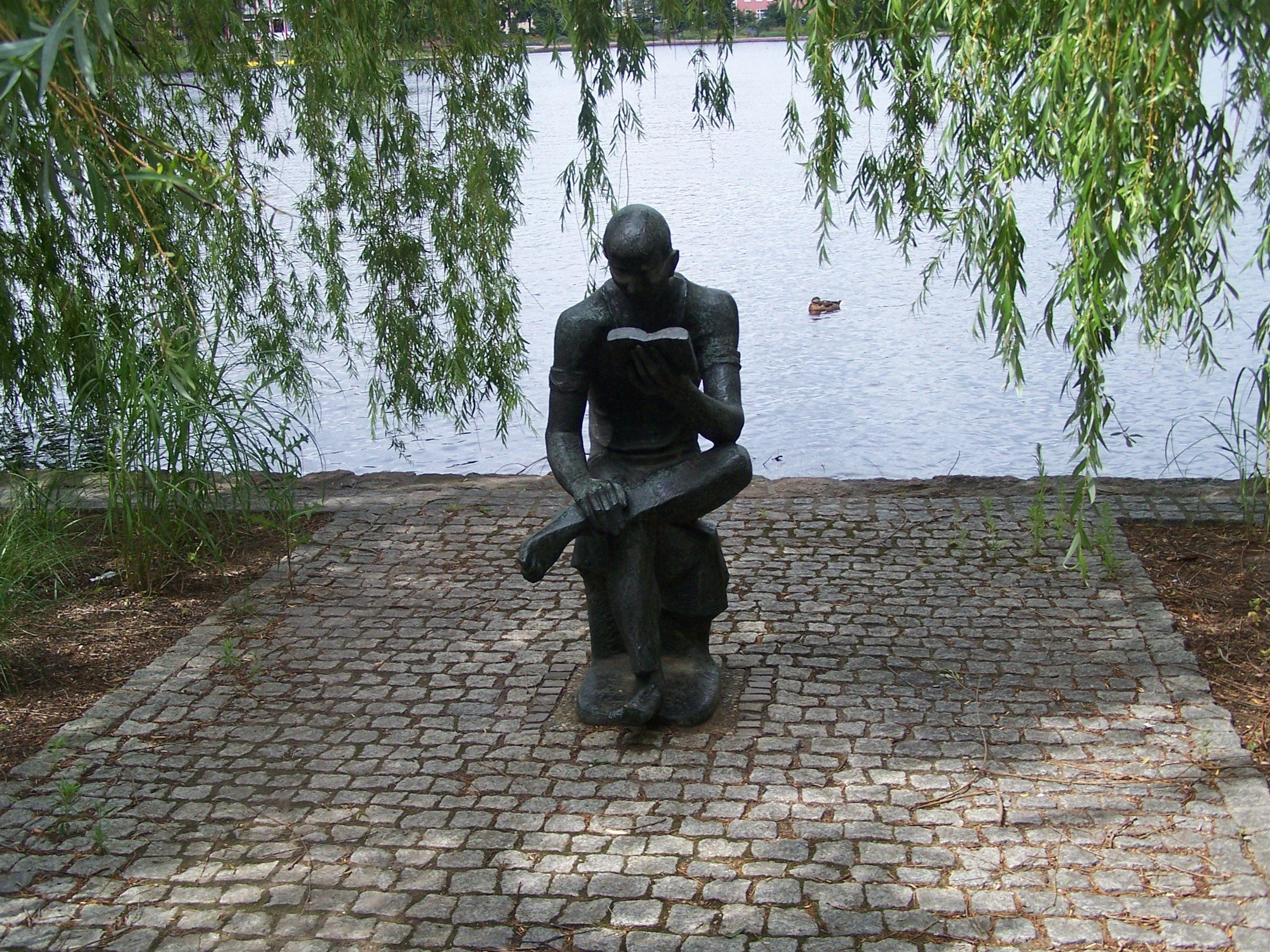 Plastik "Lesender" am Vorderen Gotthardteich in Merseburg